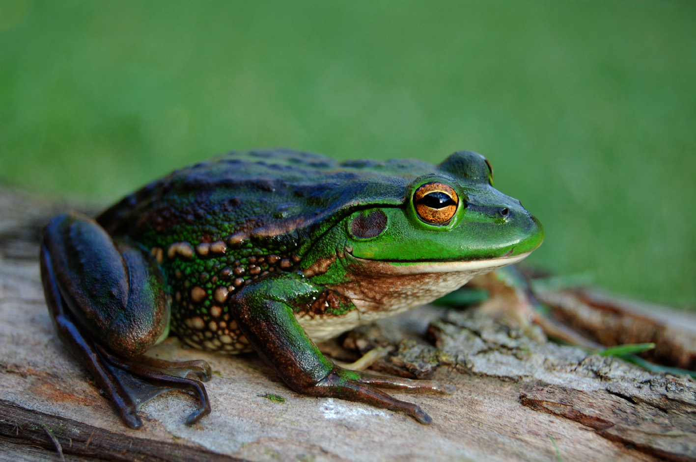 Tereza T